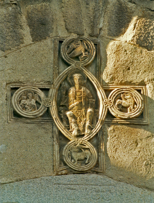 Abadia de Santa Maria d'Arles. Portal. Vallespir, França